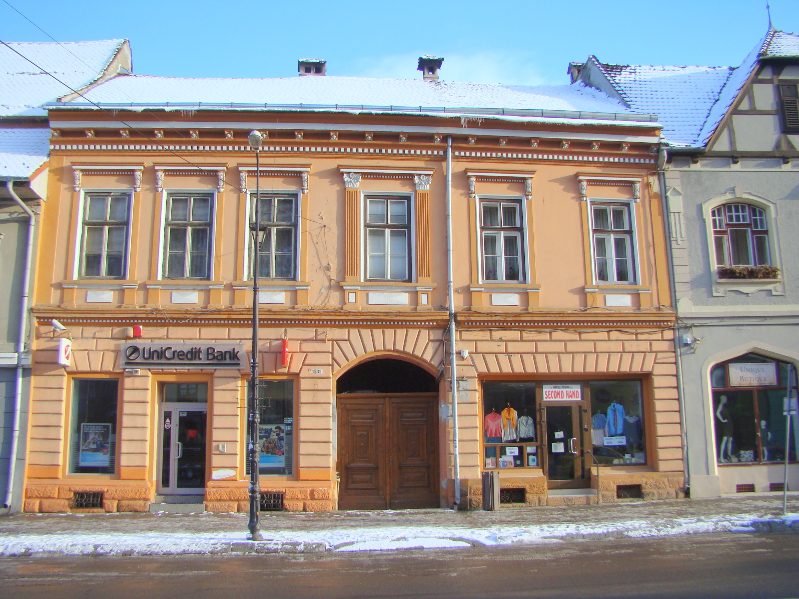 Casă, municipiul Sighișoara, Piața Oberth Hermann 30-31 1870